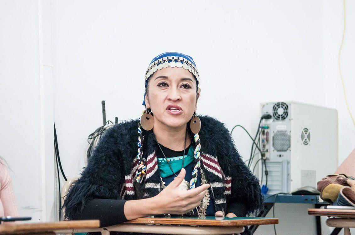 Moira Millán durante el 3º Encuentro Latinoamericano de Feminismos Ella. La Plata, Argentina, diciembre de 2018.